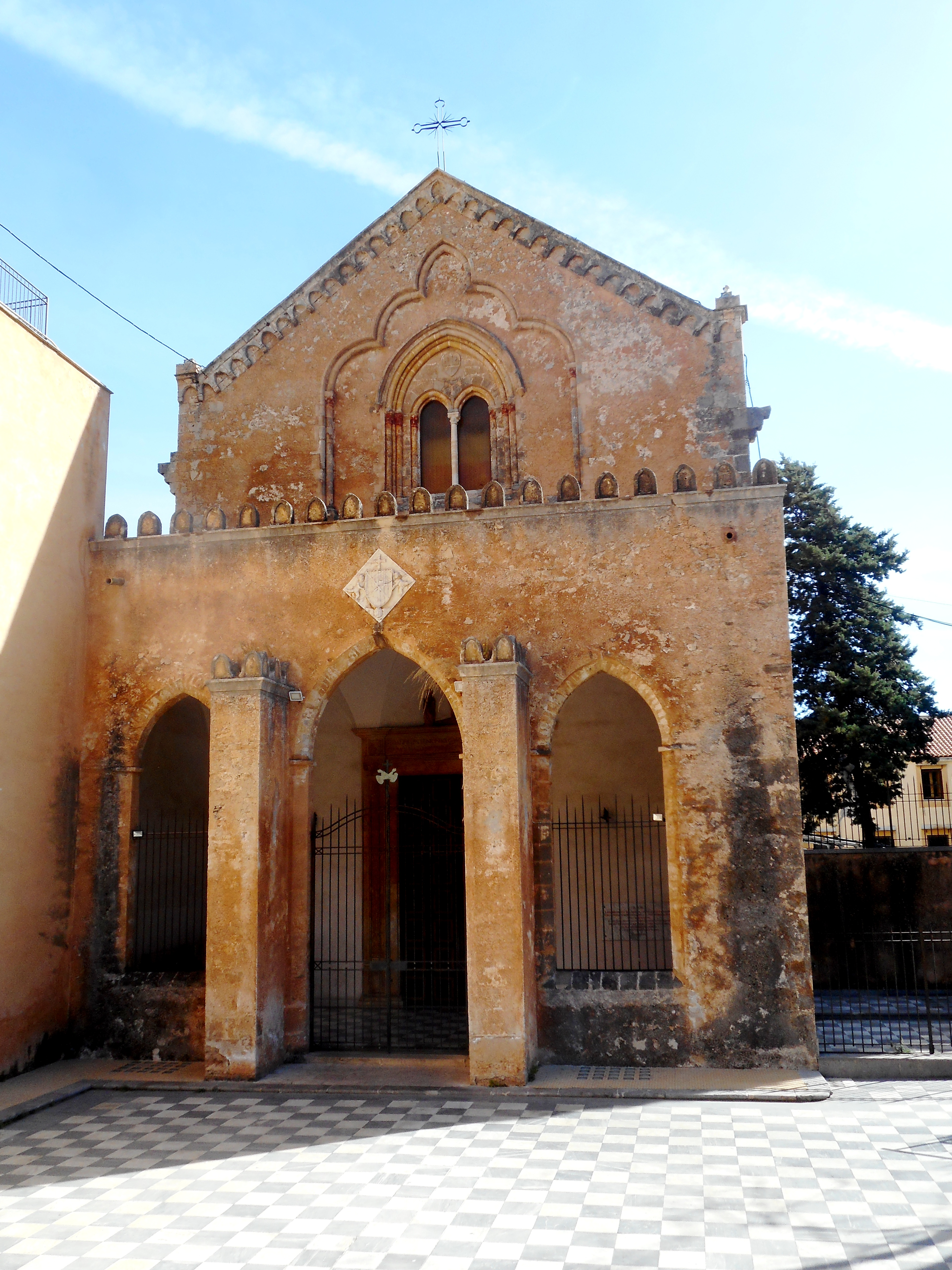 Chiesa di San Giovanni Battista a Baida